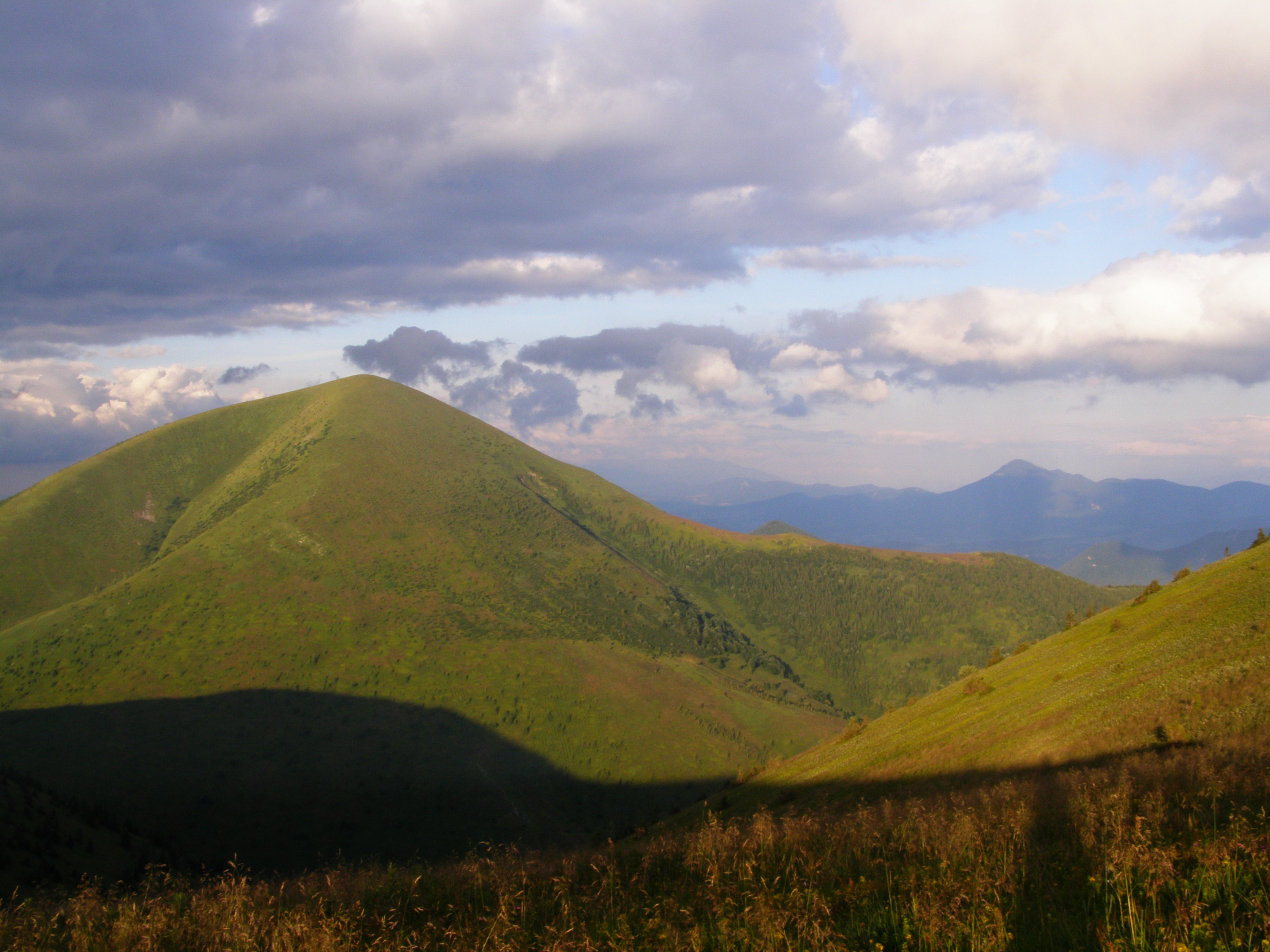 Krivánská Malá Fatra, Stoh (1607 m), pohled z Poludňového grúně